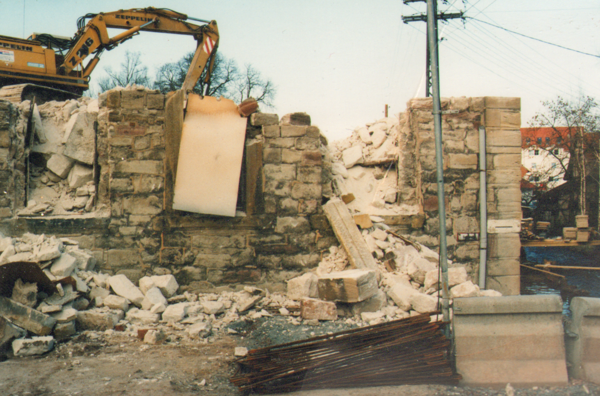 Abbrucharbeiten am Farnrodaer Schloss im März 1997.